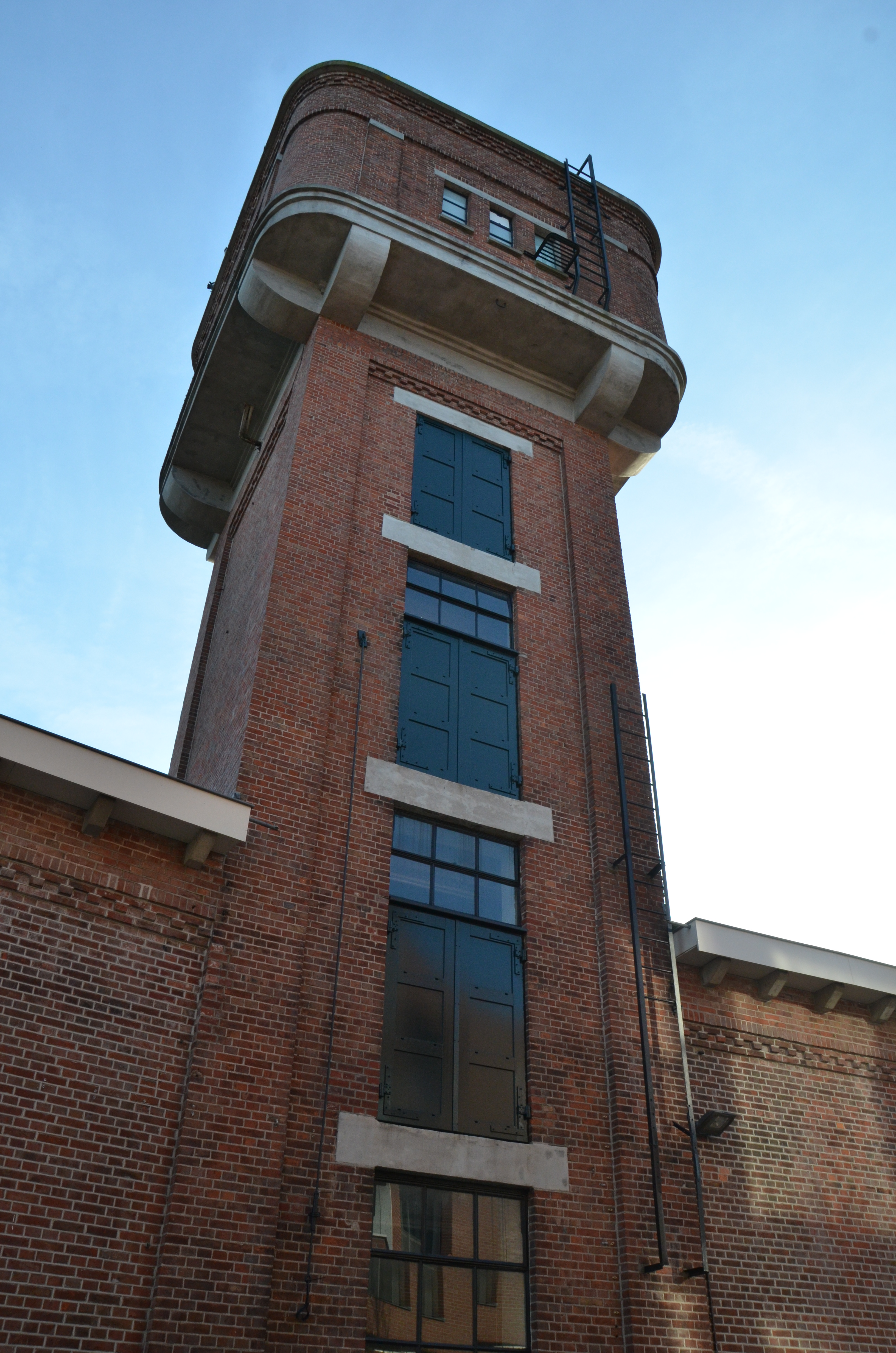 Roombeek-Roomveldje, Enschede, Netherlands